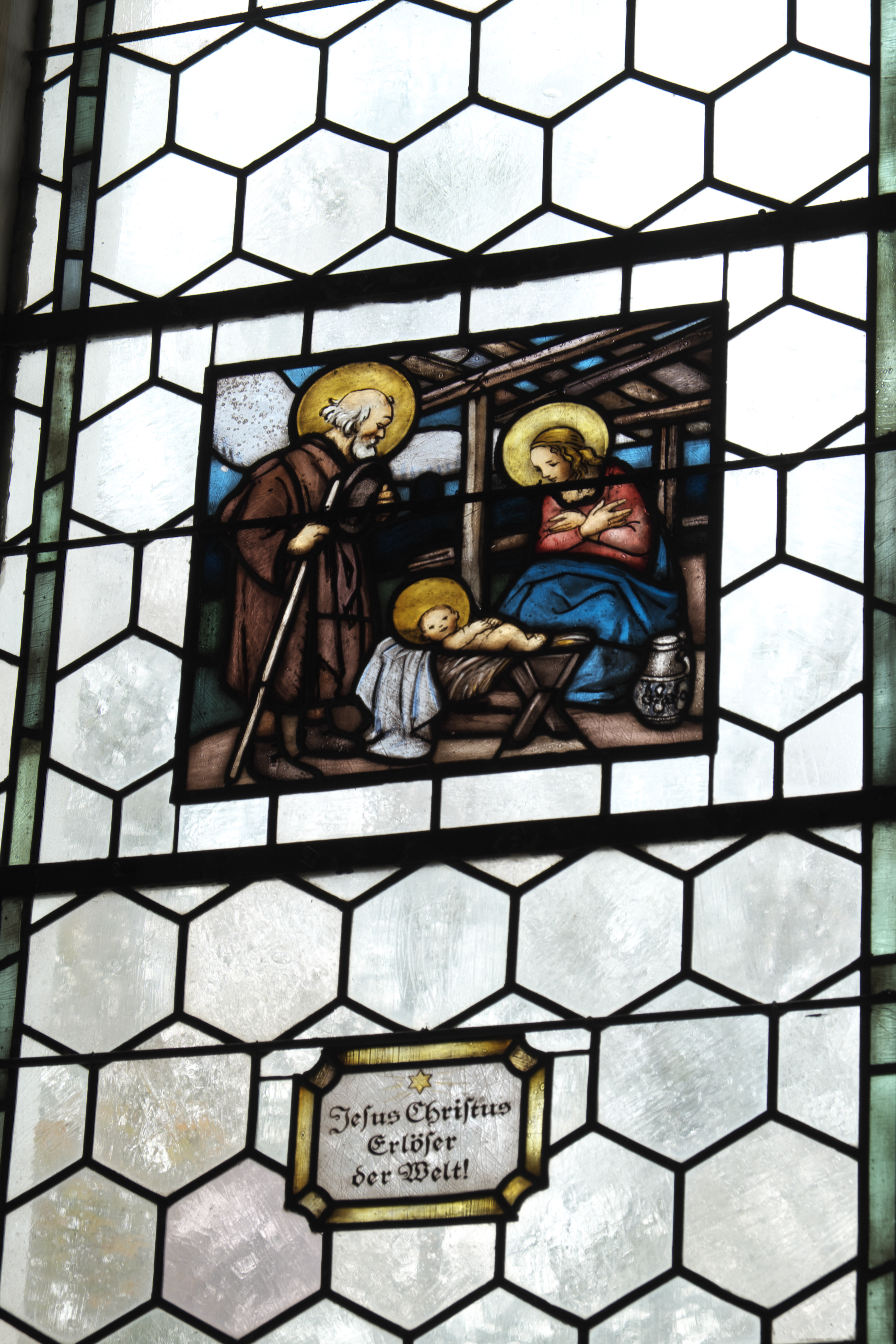 Katholische Pfarrkirche St. Benedikt in Odelzhausen im Landkreis Dachau (Bayern/Deutschland), Bleiglasfenster; Darstellung: Geburt Jesu